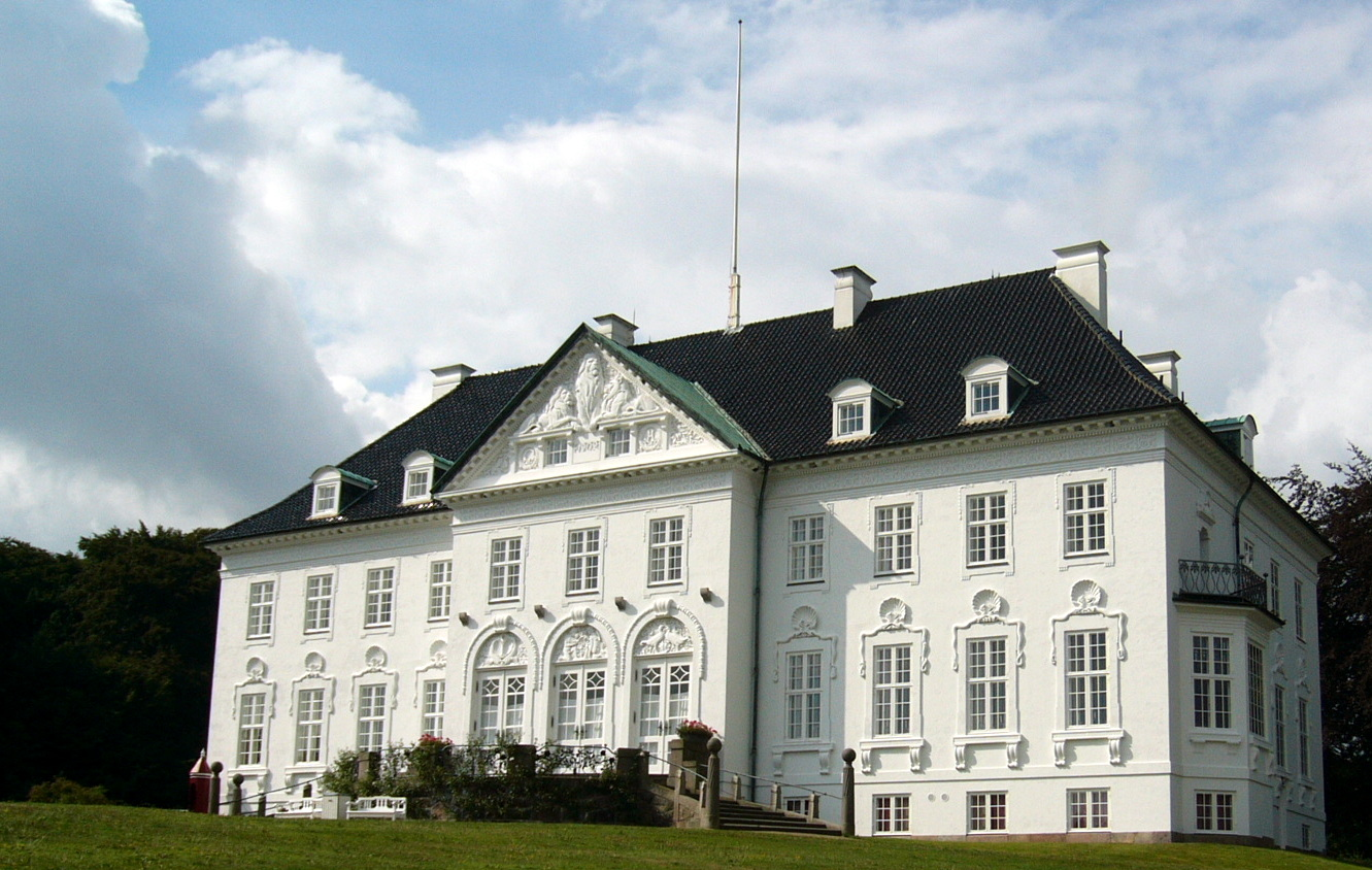 Marselisborg Slot, by myself.